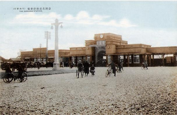 臺灣花蓮停車場，即花蓮驛